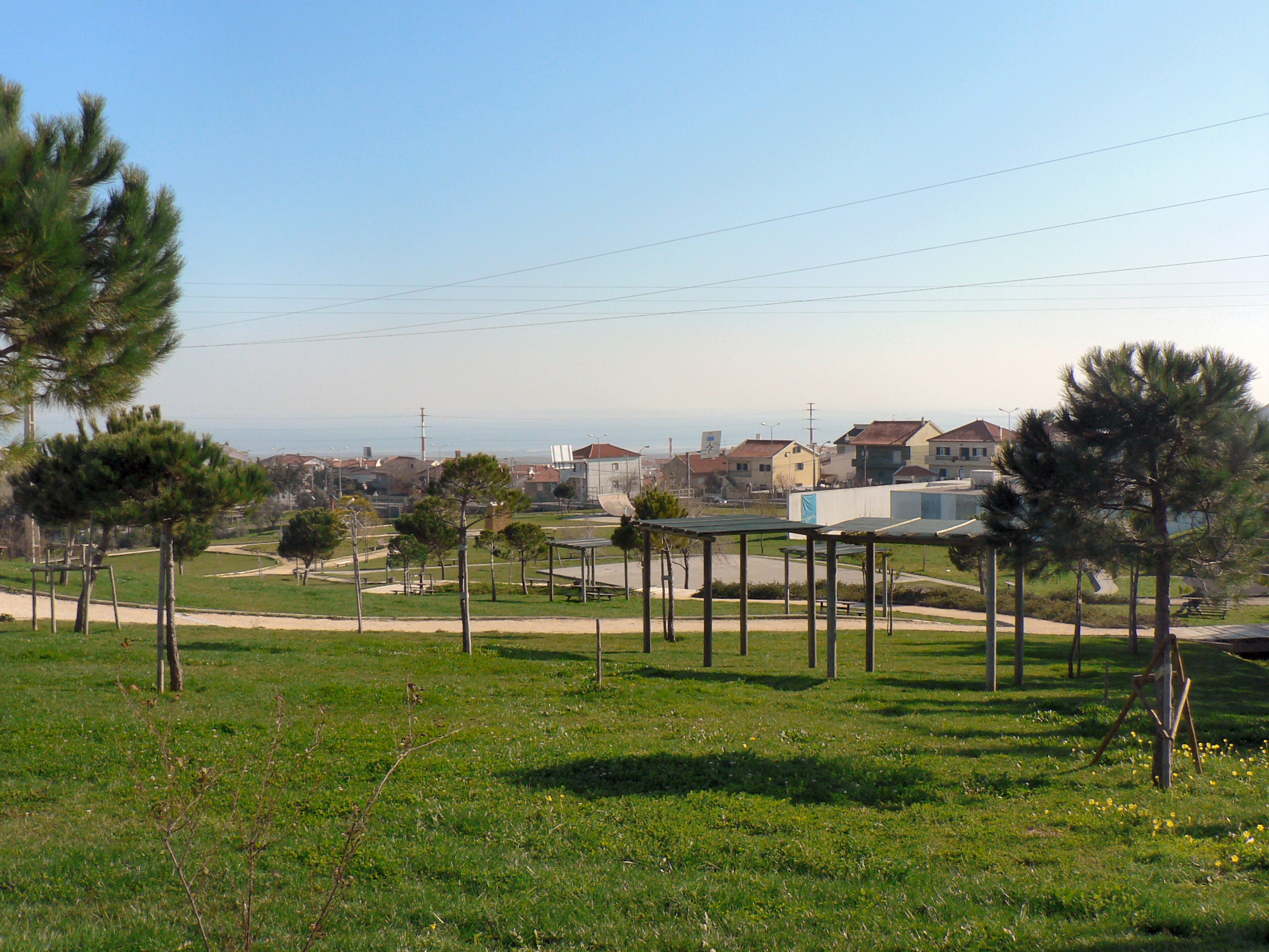 Parque Urbano de Santa Iria D'Azóia